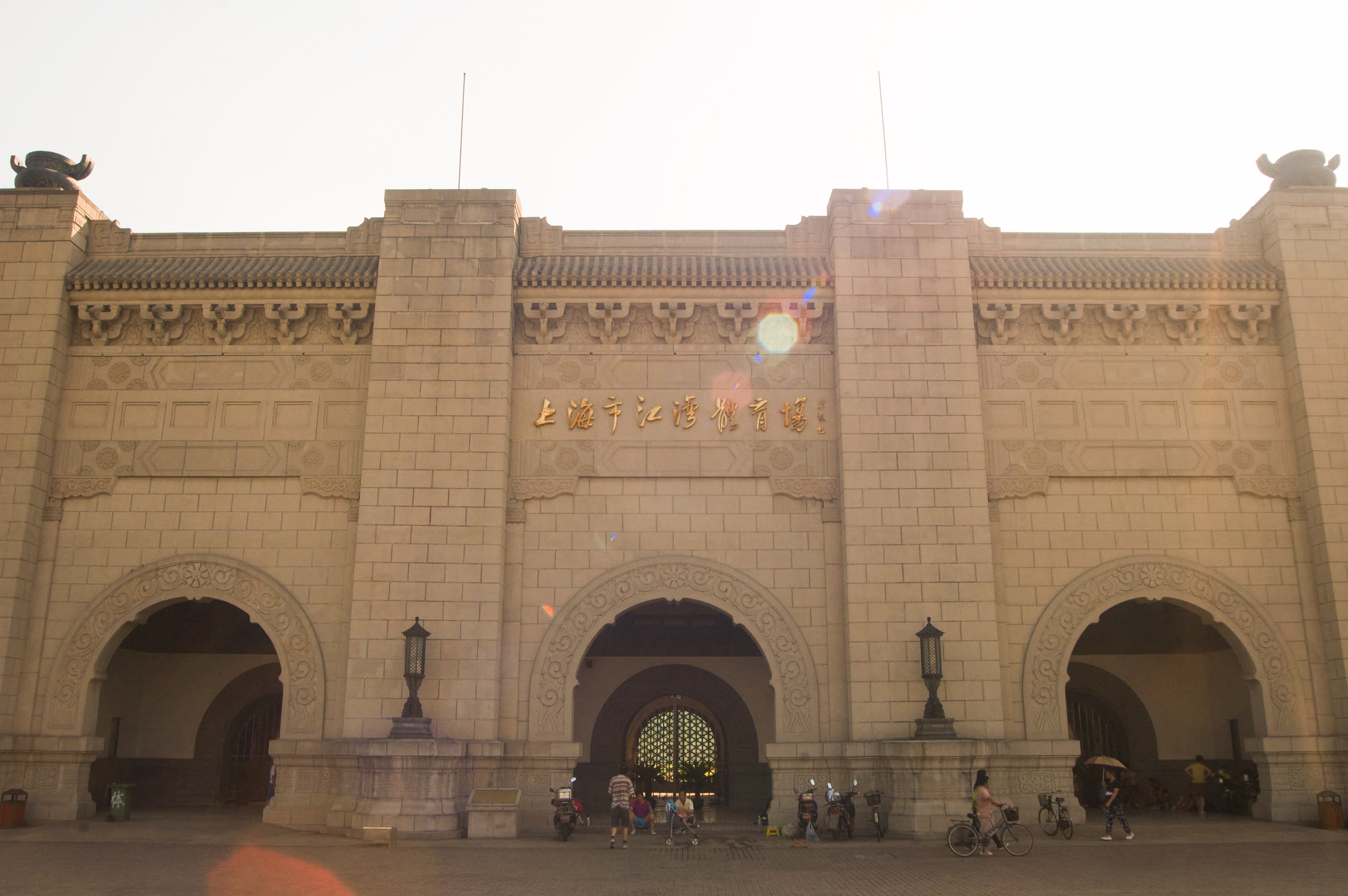 中文（中国大陆）: 上海江湾体育场